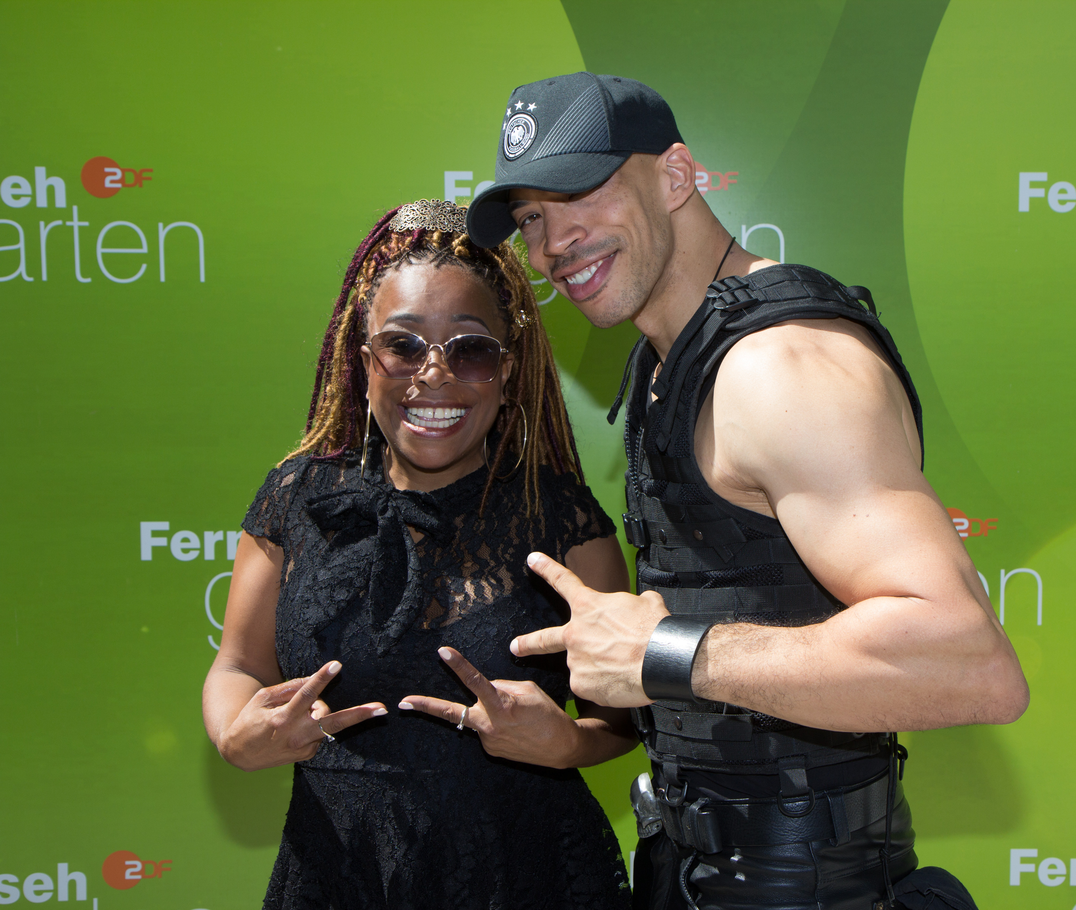 Snap! als Gast im ZDF-Fernsehgarten am 12. August 2018 in Mainz.